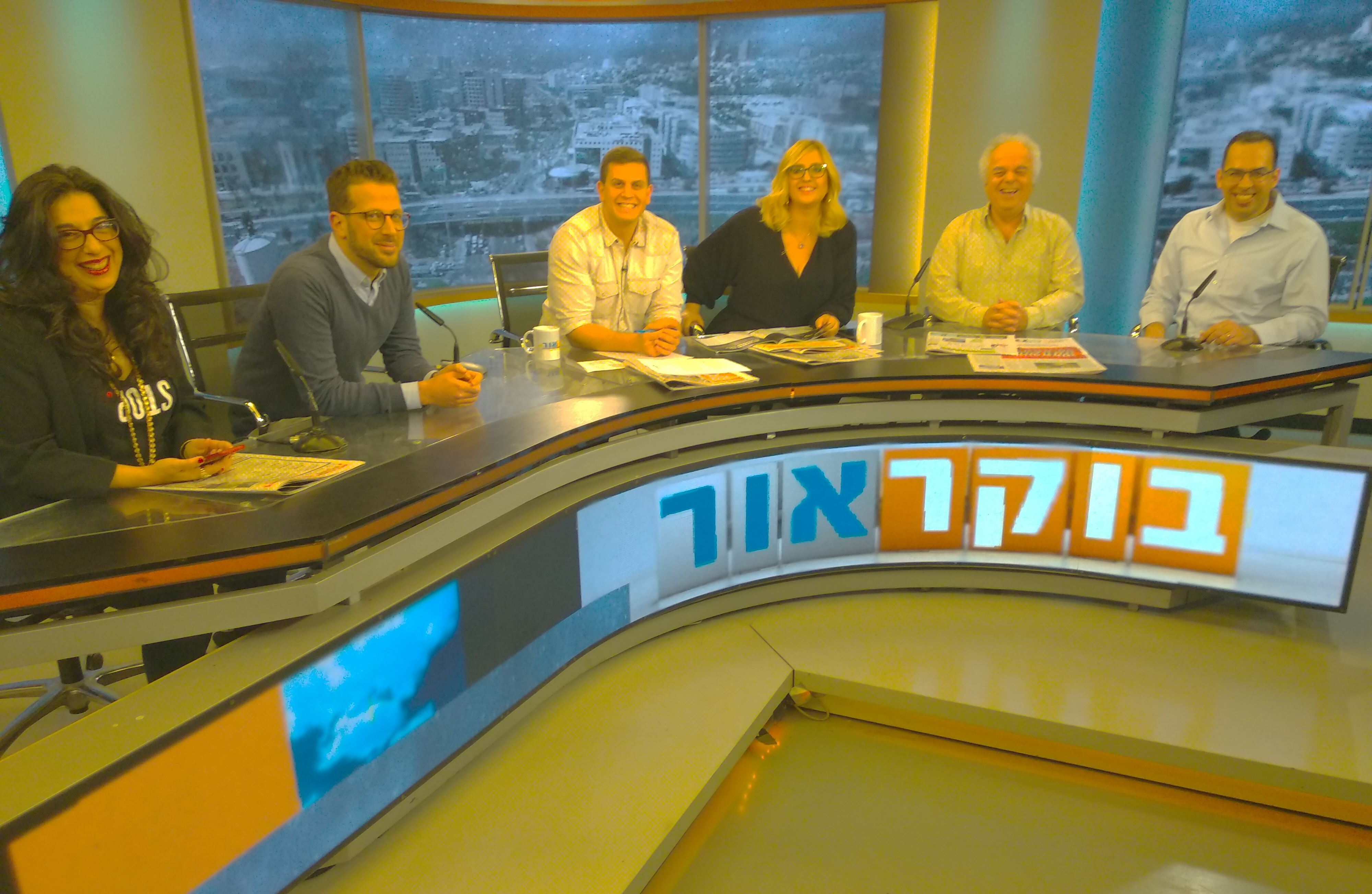 תוכנית הטלוויזיה "בוקר אור" בערוץ עשר. במרכז המראיינים, טליה פלד קינן ועומר ירדני, מימין דרור לין ודוד שי מוויקיפדיה העברית, משמאל ענת לב אדלר מ"ידיעות אחרונות" וליאור פרידמן מ"פרטנר"